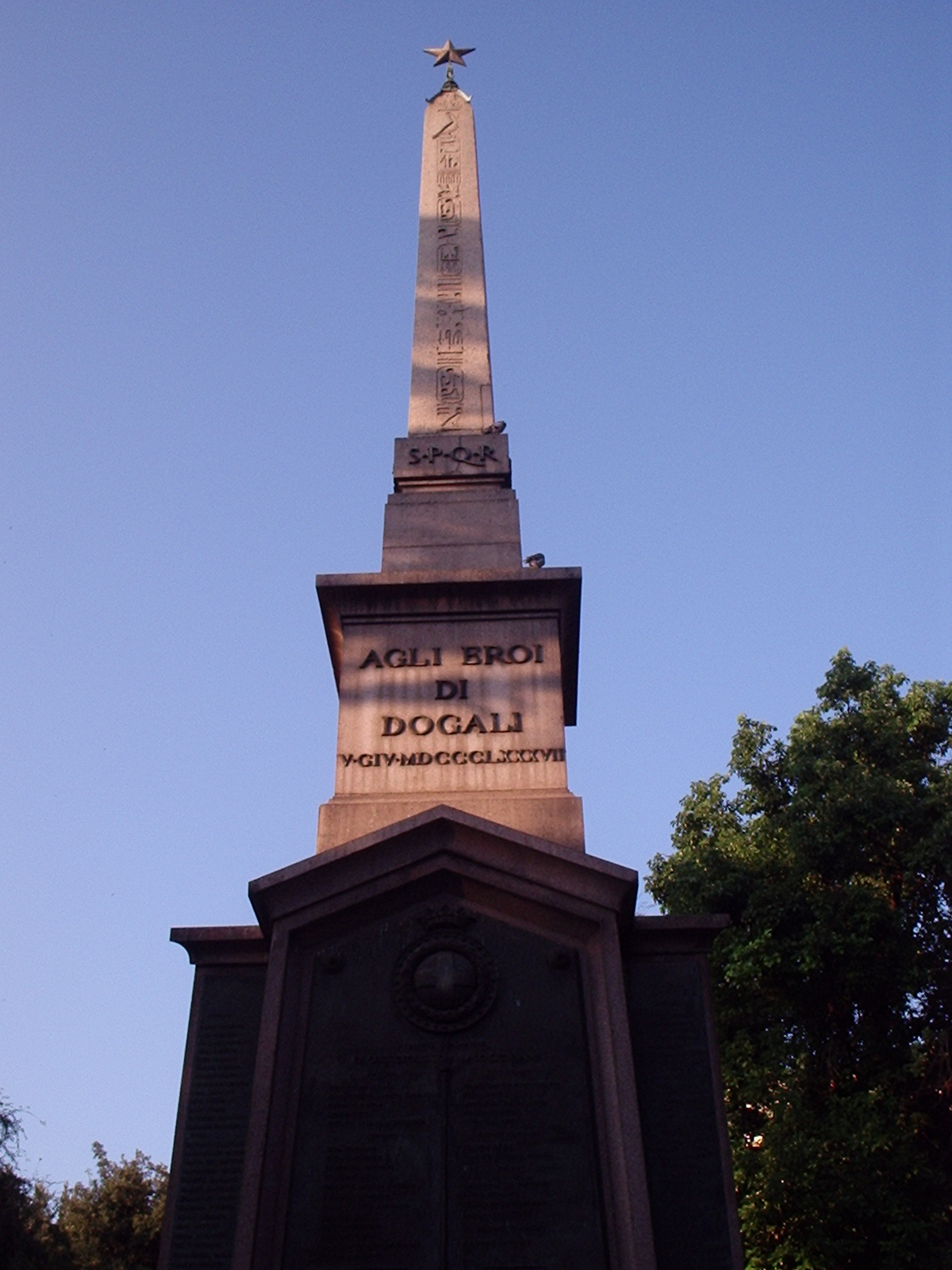 monumento a Dogali in piazza dei Cinquecento angolo viale L. Einaudi, Roma